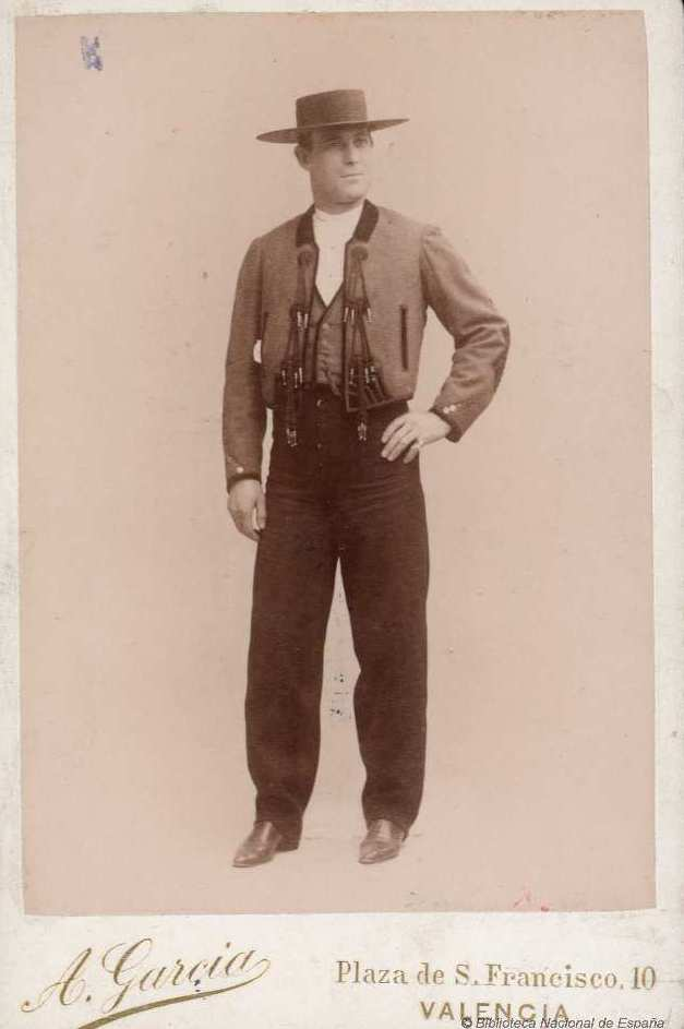 Francisco Aparici Pascual, Fabrilo; fotografía de Antonio García, Valencia, 1897. Biblioteca Nacional de España